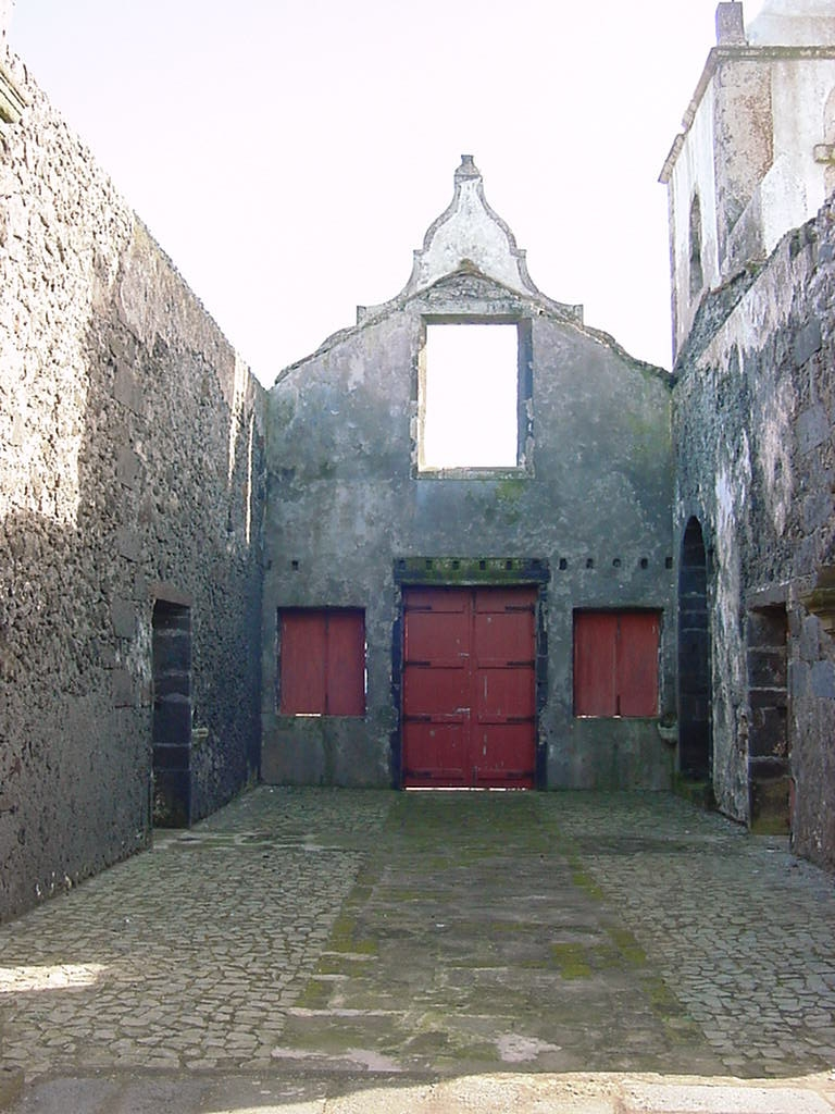 Igreja Velha de São Mateus da Calheta, interior, Terceira, Açores, Portugal.